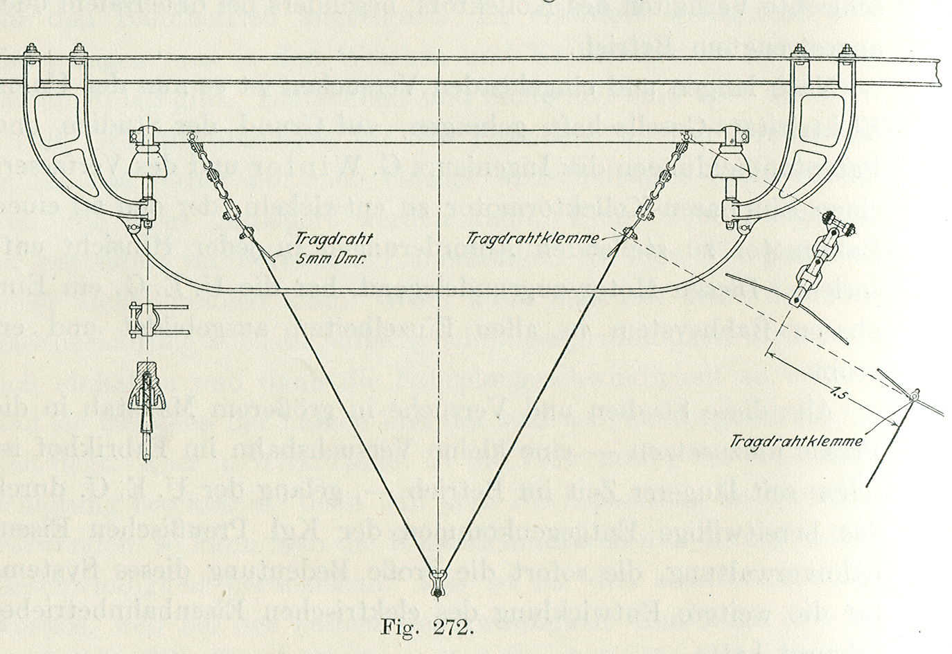 Querschnitt der Kettenfahrleitung auf der Versuchsstrecke Niederschöneweide-Spindlersfeld